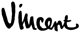 Vincent van Goghs signatur